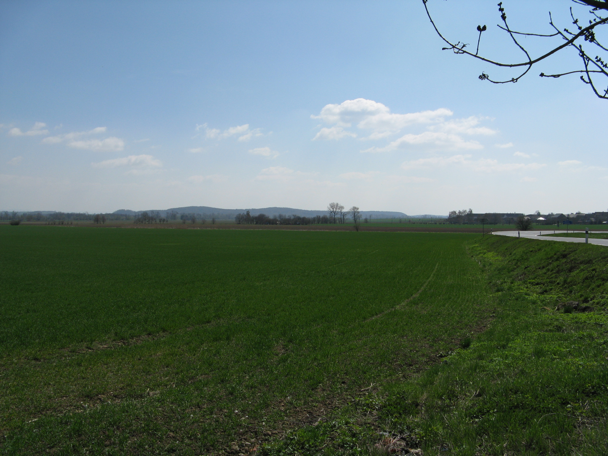 Česky: MB-pohled V směrem (vlevo obec Libivá)